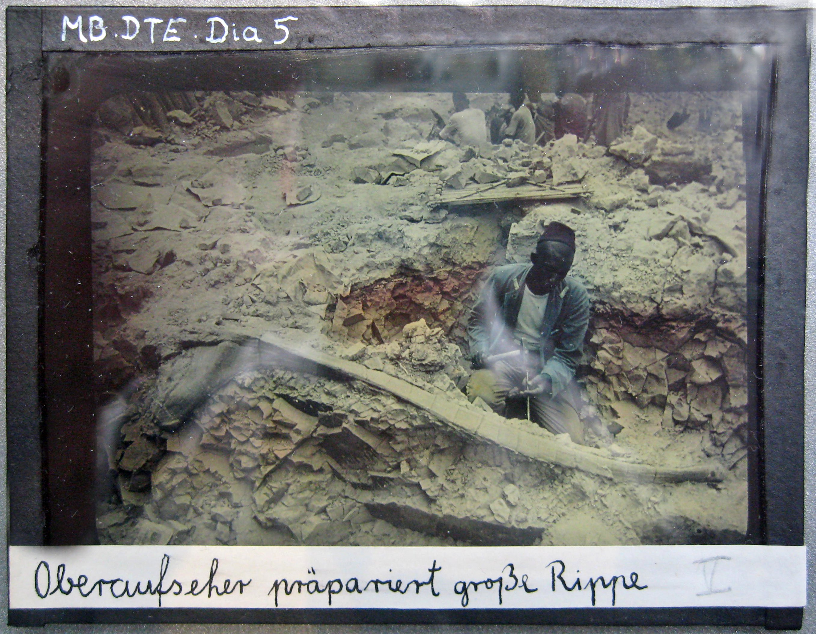 Tendaguru Expedition, Boheti bin Amrani.